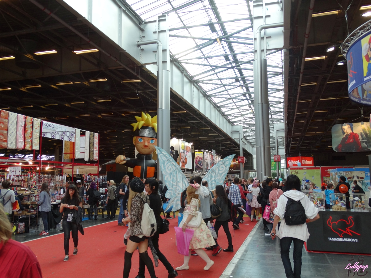 Japan Expo 2014, Villepinte, France.